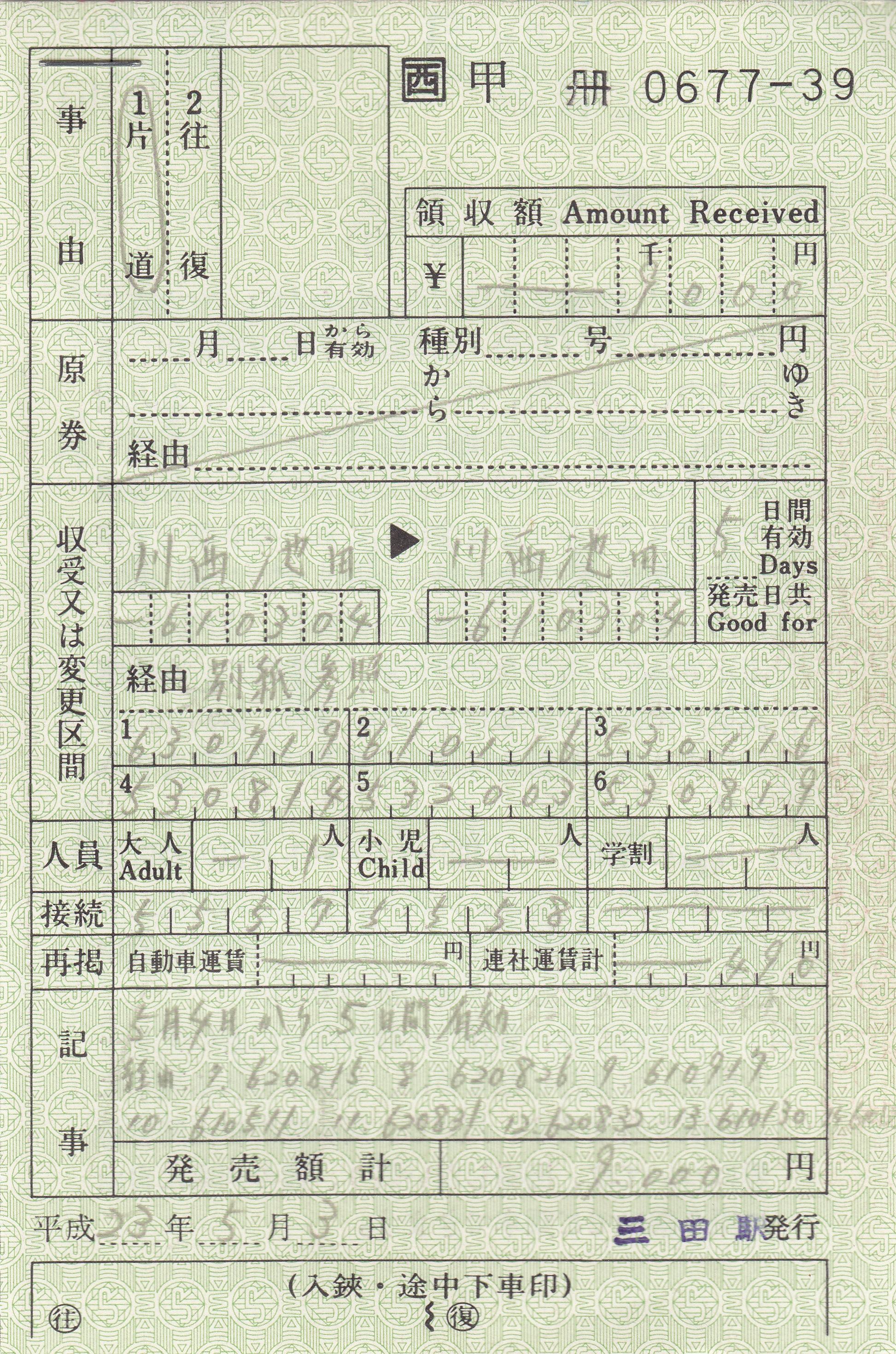 JR福知山線三田駅みどりの窓口発行の出札補充券です。